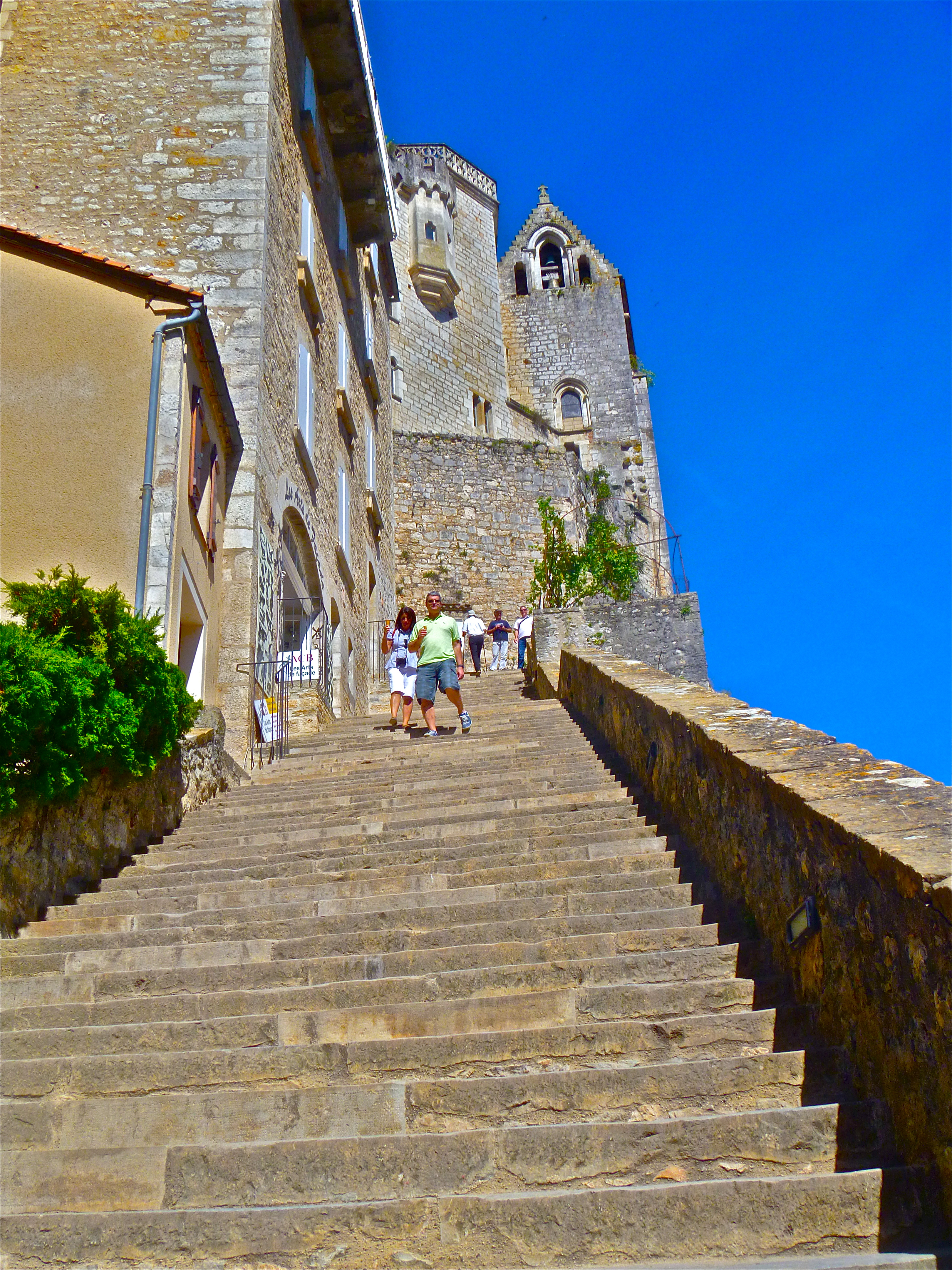 Parvis et escaliers de la cité religieuse (Classé) .